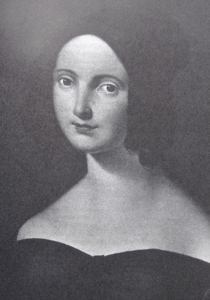 Gaetano Donizettis wife Virginia Vasselli